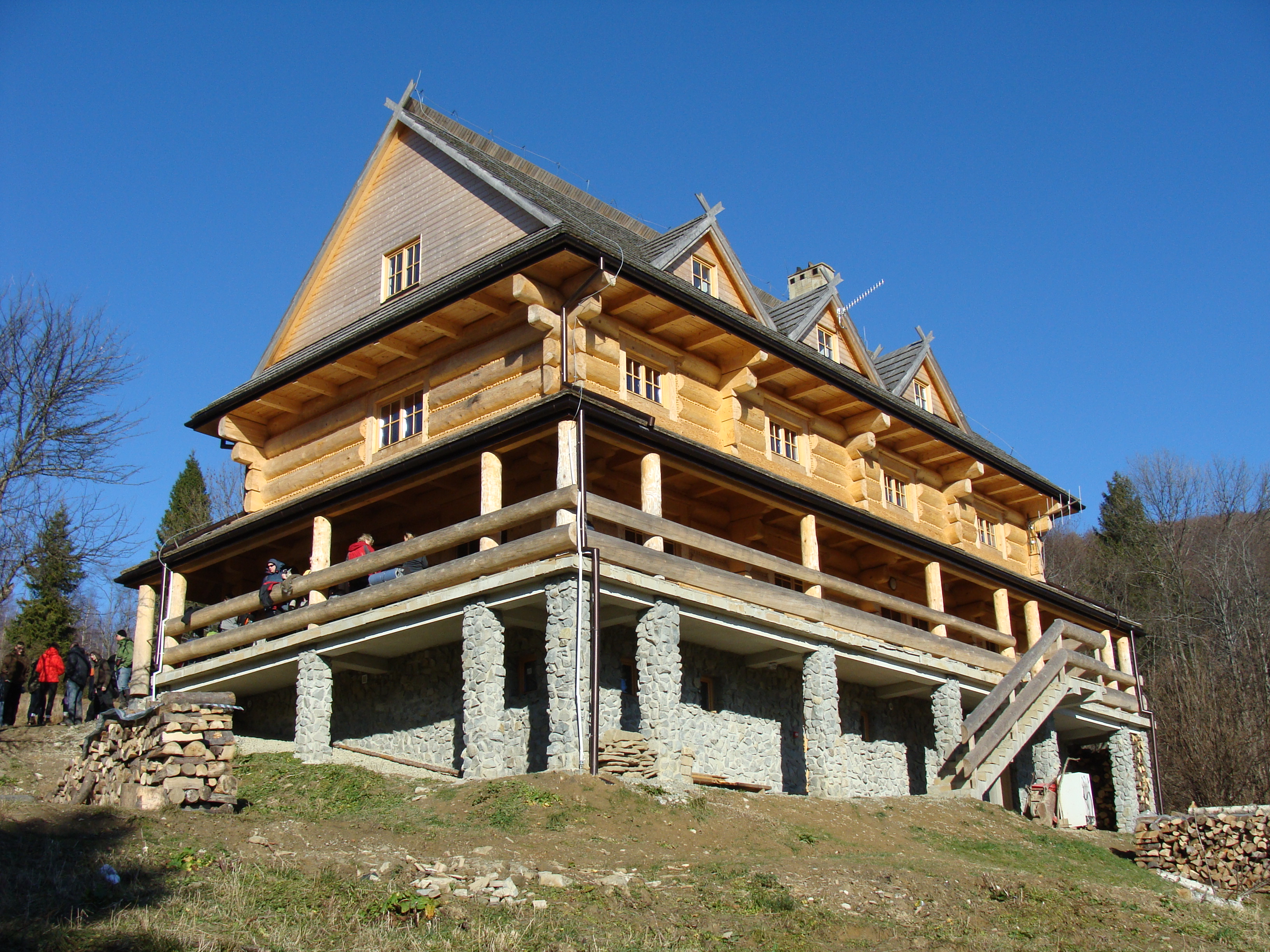 Schronisko Koliba, Bieszczady, 14 listopada 2010 roku.